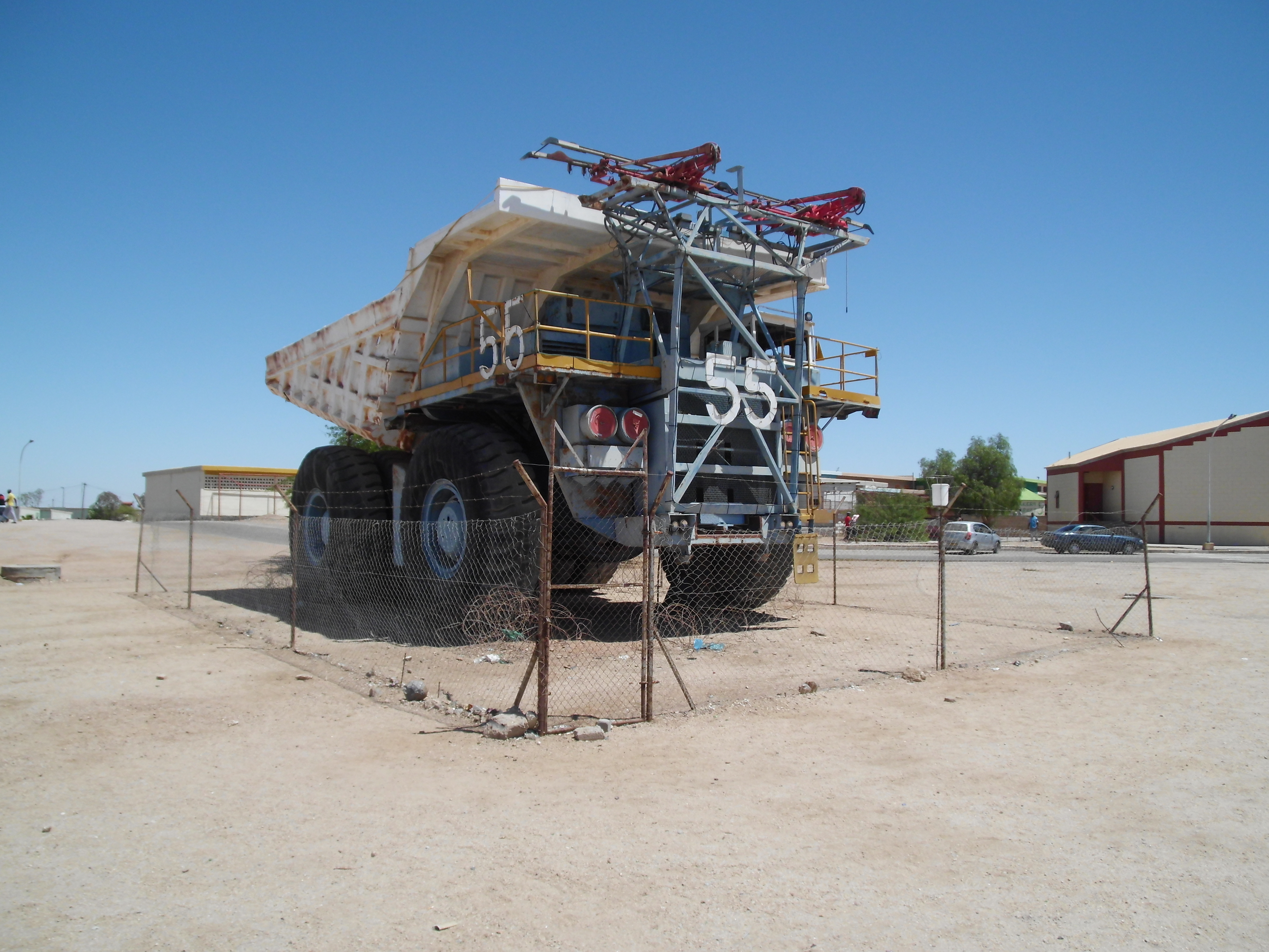 Uranminen-Muldenkipper-Monument in Arandis, Namibia